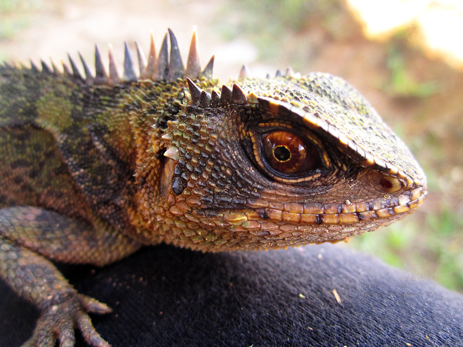 Iguana en la Catarata Salto del Cotomono